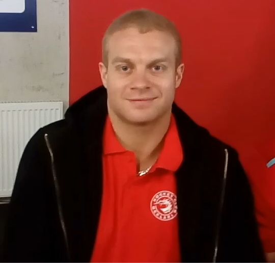 Po zakončení sezóny 2016/17 na autogramiádě ve Werk Areně